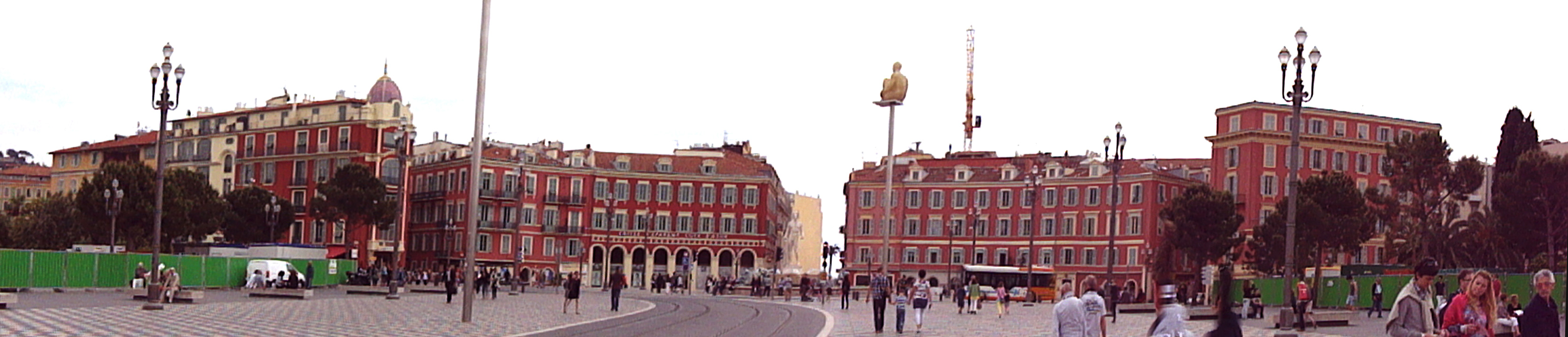 Place Masséna (Nice, France)